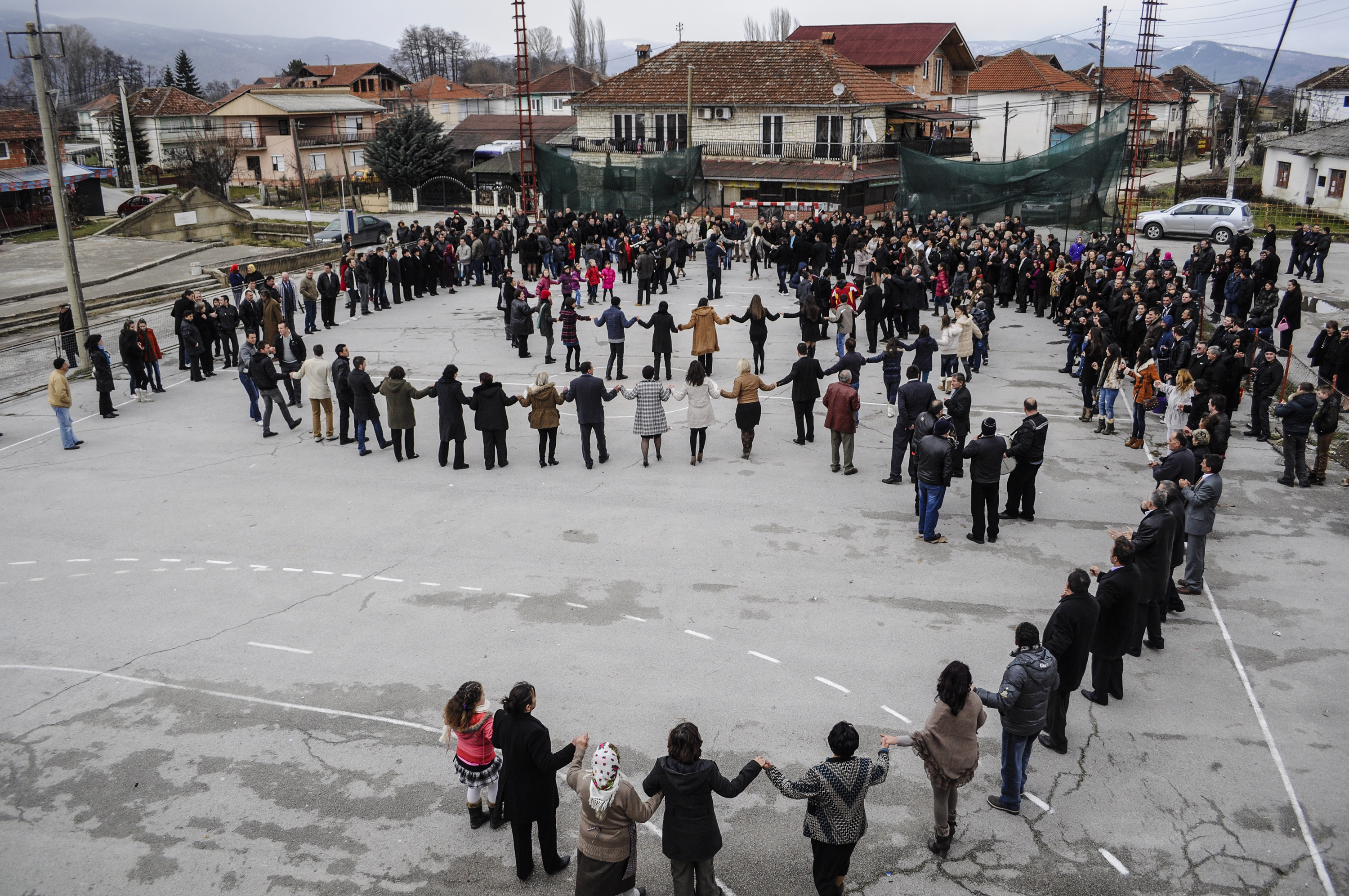 според македонските обичаи за време на Водици се вие оро сретсело, во Драслајца, Струга